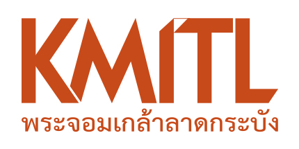 เครื่องหมายประจำสถาบันนี้ออกแบบขึ้นจากอักษรหรือกราฟิกประดิษฐ์ที่มีเอกลักษณ์เฉพาะ แสดงถึงสถาบันเทคโนโลยีพระจอมเกล้าเจ้าคุณทหารลาดกระบัง ใช้เป็นเครื่องหมายในการสื่อสารที่เป็นแบบเดียวกันทั้งสถาบัน เพื่อให้นักศึกษา บุคลากร ตลอดจนประชาชนทั่วไปสามารถจดจำและมีความน่าเชื่อถือต่อองค์กร นำใช้ในกรณีไม่เป็นทางการหรือกรณีที่ใช้ตราสัญลักษณ์ประจำสถาบันแล้วไม่เหมาะสม เช่น กระดาษบันทึกทั่วไป หีบห่อหรือตัวสินค้า เสื้อ ของที่ระลึก (บางอย่าง) แก้วน้ำ แก้วกาแฟ จานรอง ปากกา ดินสอ นามบัตร แผ่นสติ๊กเกอร์ติดกระจกรถยนต์ เป็นต้น ซึ่งการนำใช้ดังกล่าวสามารถแยกใช้เฉพาะอักษรภาษาอังกฤษอย่างเดียวได้ด้วยเช่นกัน